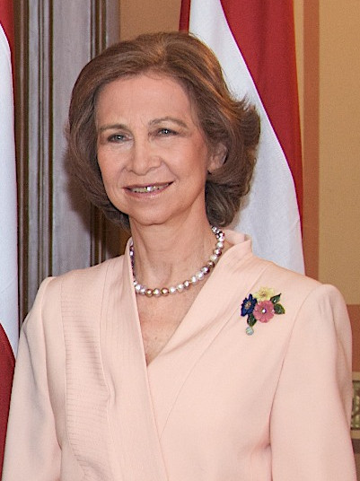 Ministru prezidents Valdis Dombrovskis ar dzīvesbiedri Āriju (no kreisās) un Spānijas karalis Huans Karloss I un karaliene Sofija, 2009.gada 6.maijs